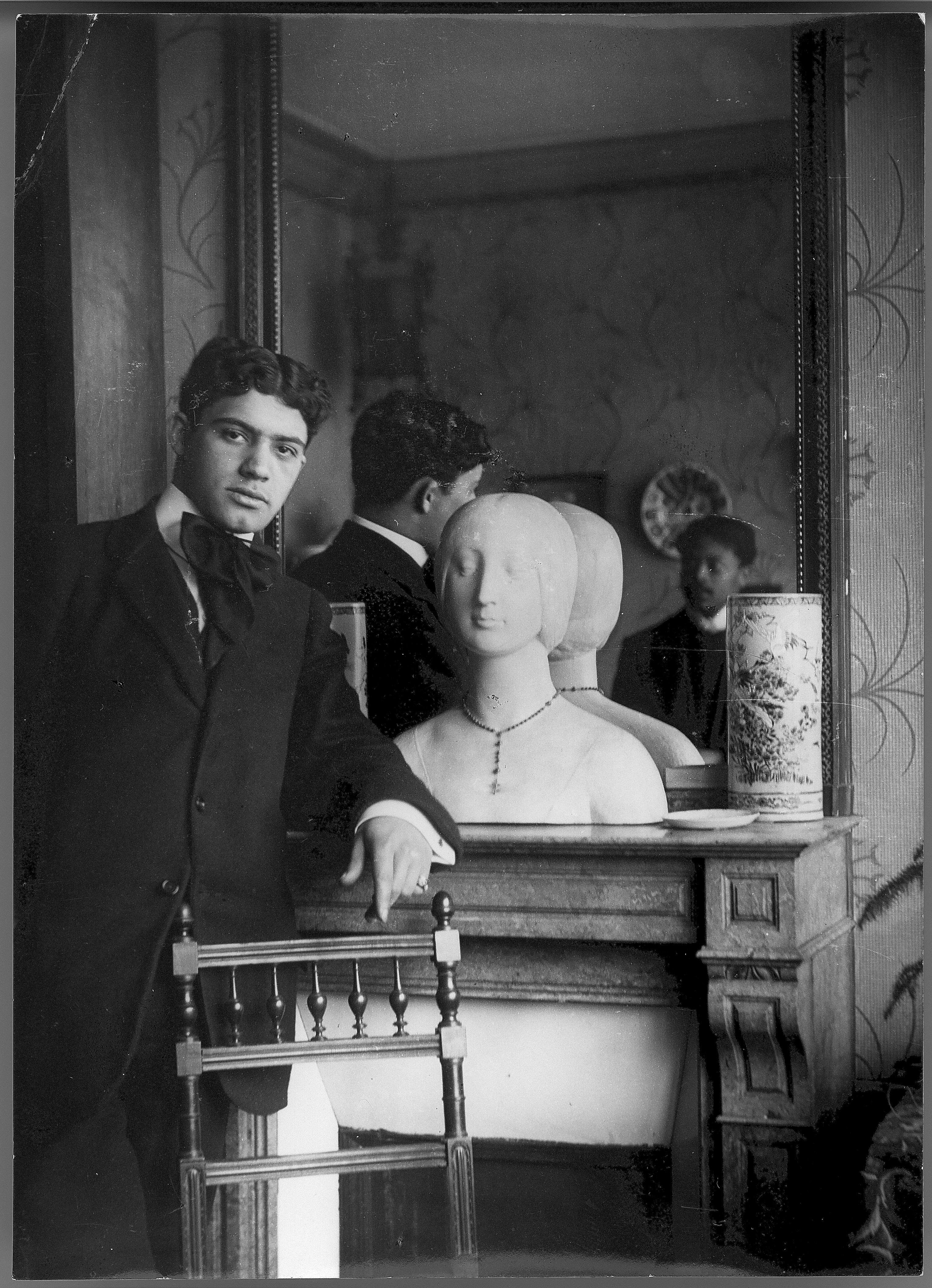 Amadeo de Souza Cardoso devant un miroir qui reflète Emérico Nunes (1888-1968). Paris (France). [dans l'appartement d'Amadeo sur le Boulevard du Montparnasse].